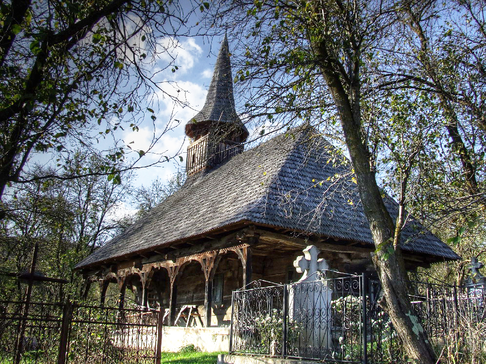 Biserica de lemn din Sâmboieni (Biserici de lemn din Cluj)